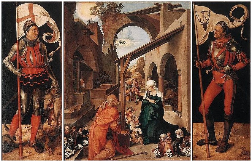 Altare Paumgartner, 194032c, 1262x720px